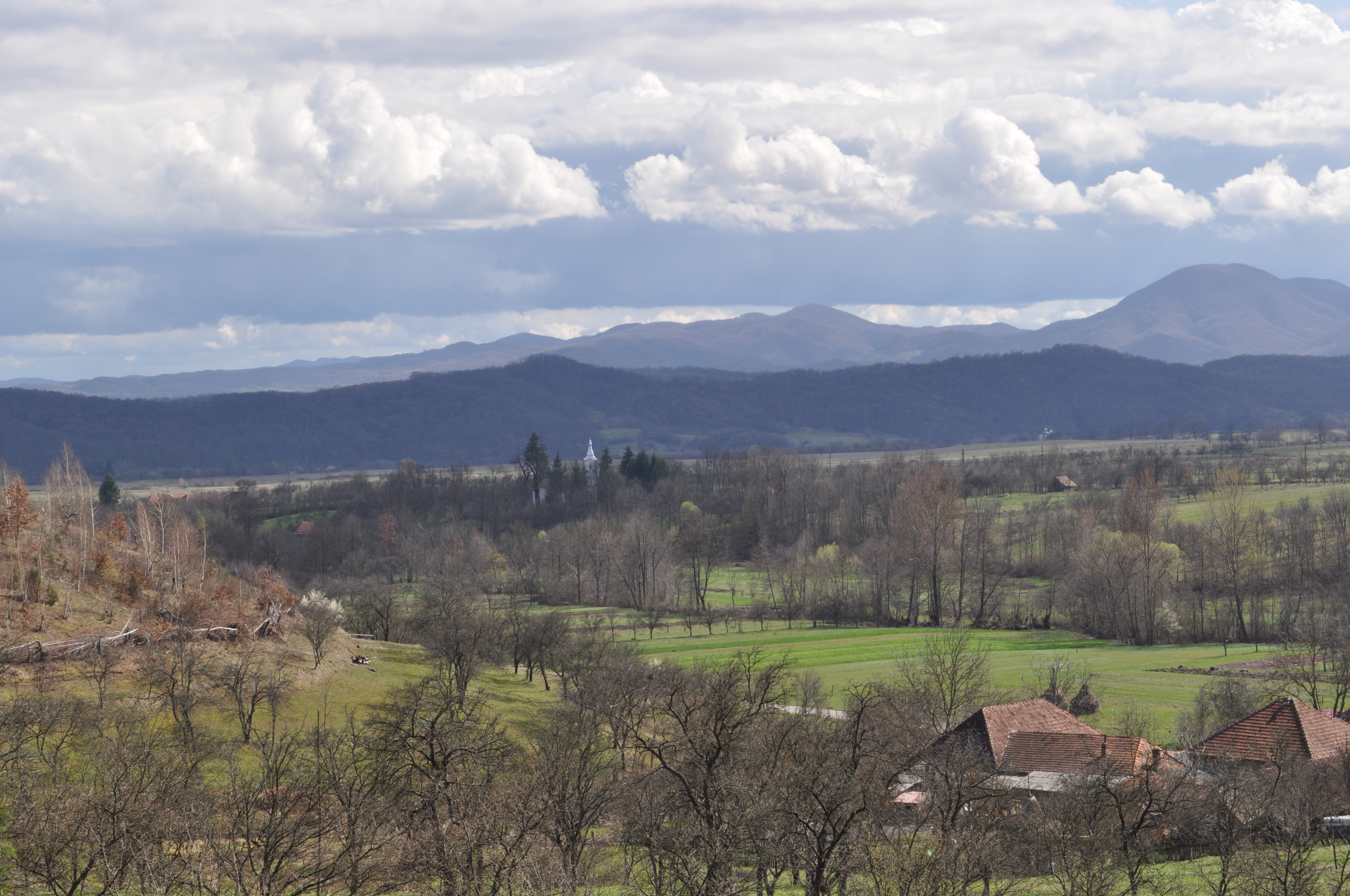 Biserica „Sfântul Ierarh Nicolae”, sat OBÂRŞA; comuna TOMEŞTI